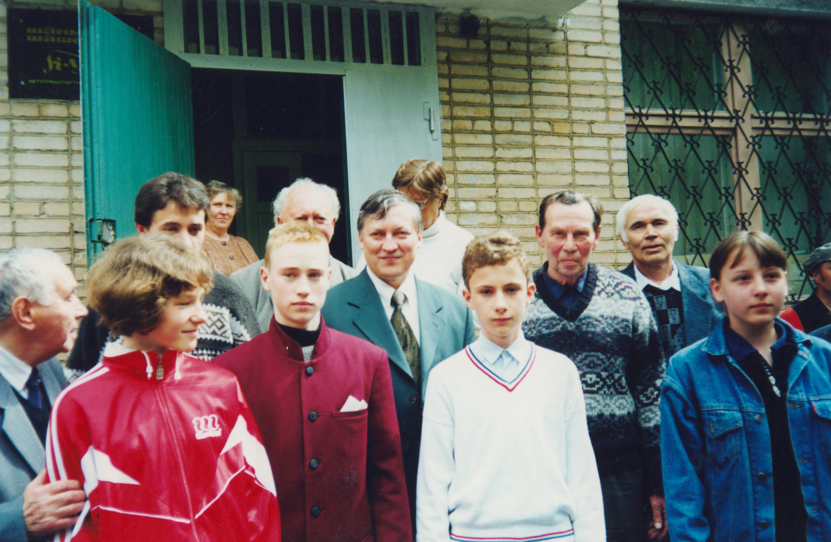 Анатолий Карпов со своим первым тренером Дмитрием Артемьевичем Зюляркиным в Златоусте в 2001 году